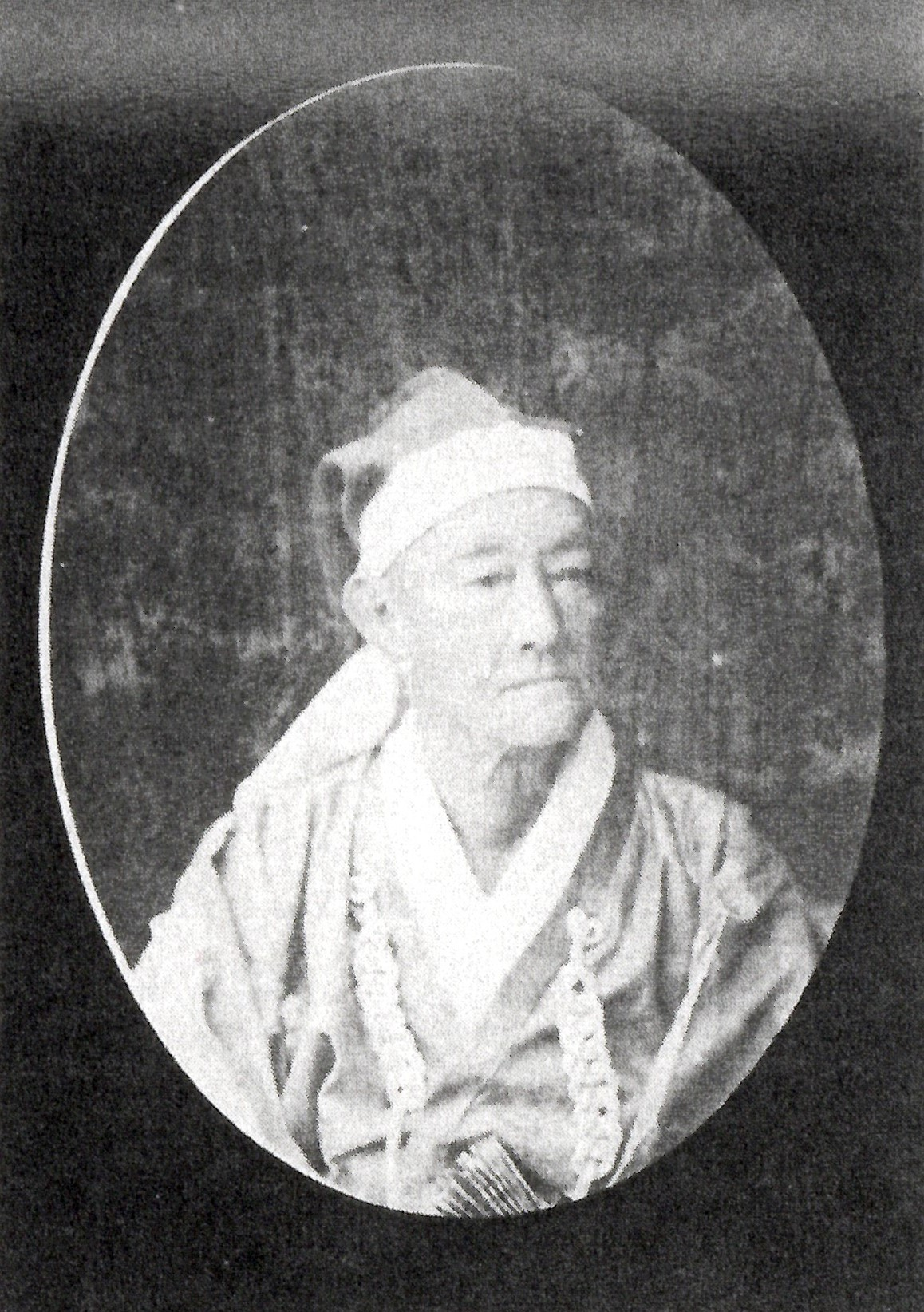 松平頼縄の肖像写真。